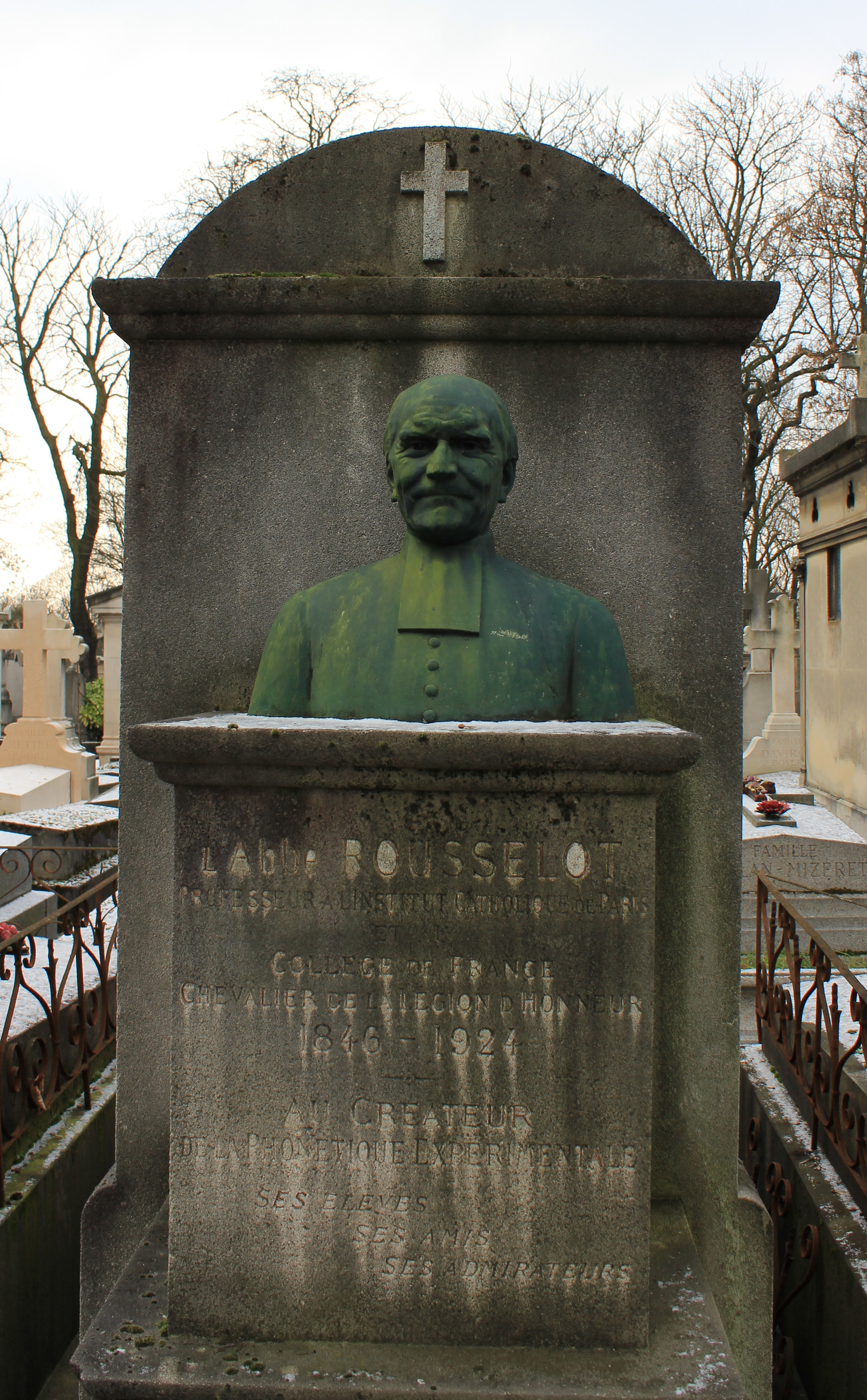 Monument composé d'un buste en bronze de l'abbé Rousselot et d'une plaque de marbre.